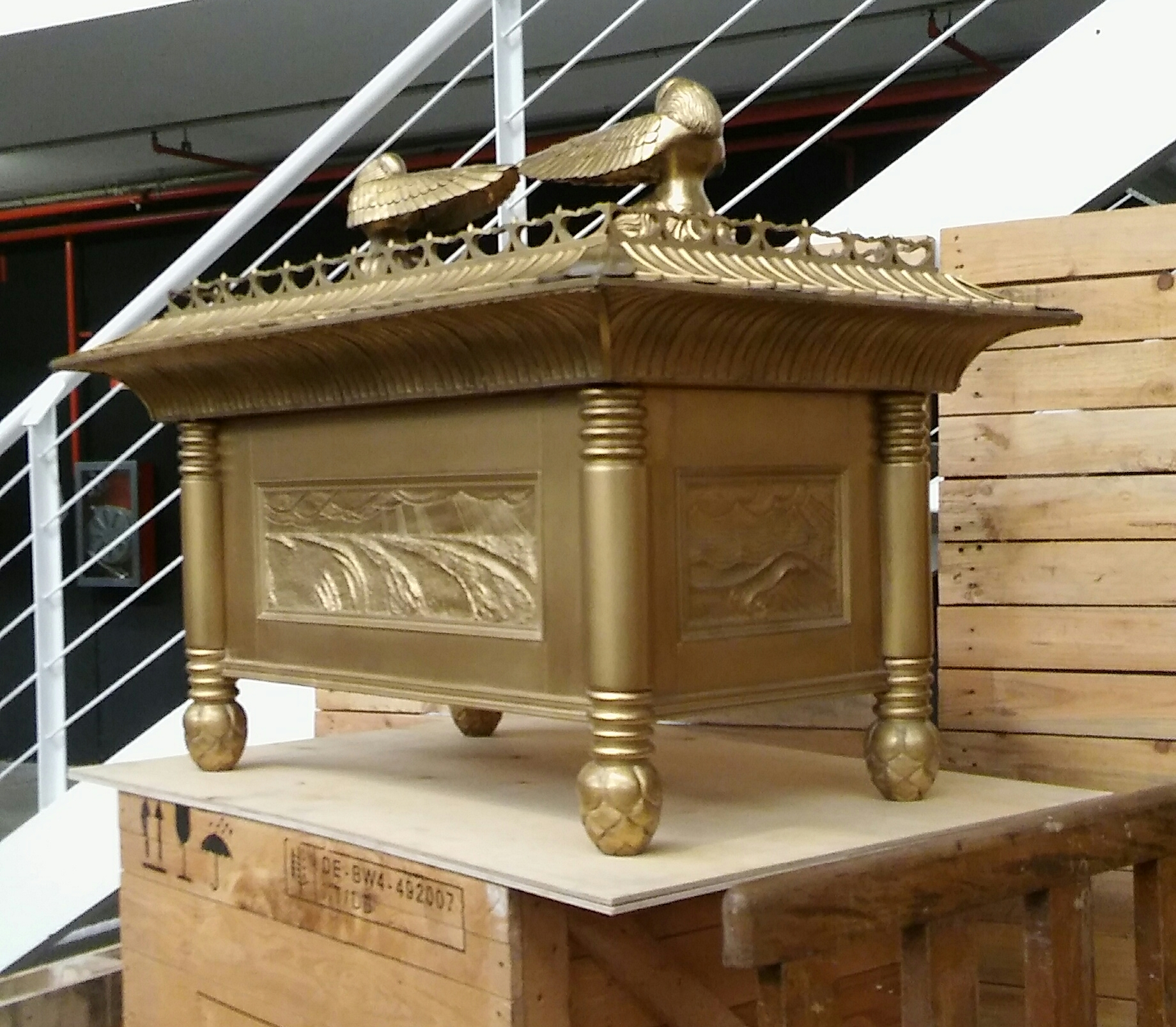 Arca del Alianza en el Salón del cine Barcelona 2016